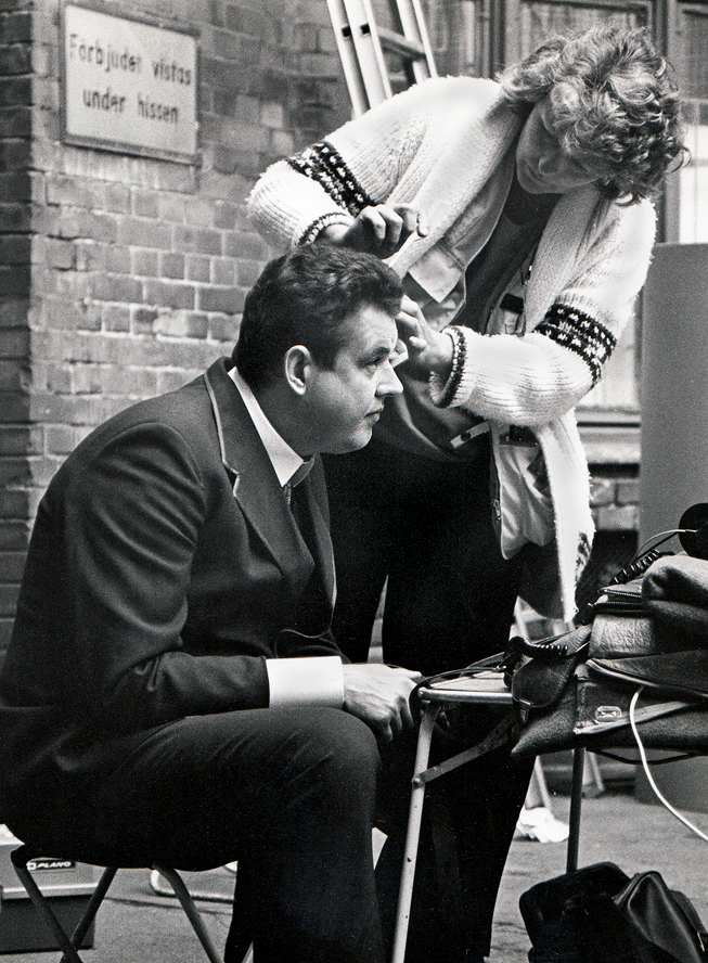 Mikael Segerström sminkas inför en tagning i "Allt ljus på mig!" en dramadokumentär från 1987 om Edvard Perssons liv.